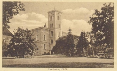 Pałac Twardawa, lata 20-te XX w.